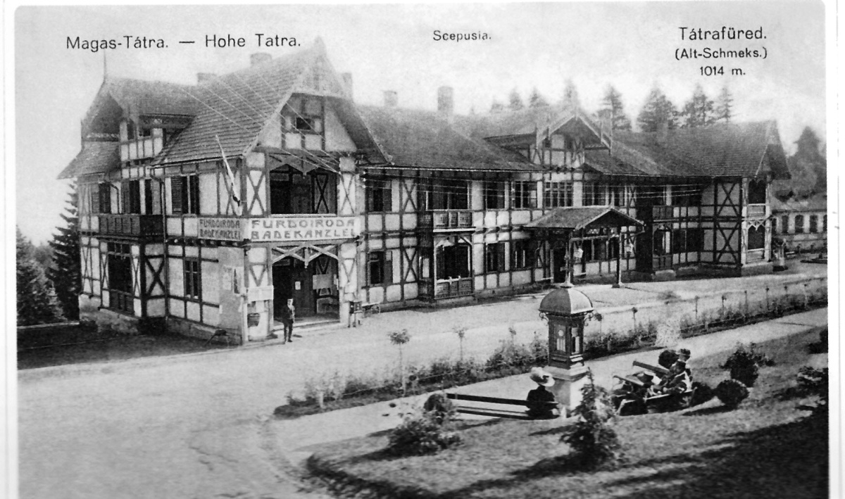 historická fotografia meteorologickej stanice. Je postavná pri chodníku